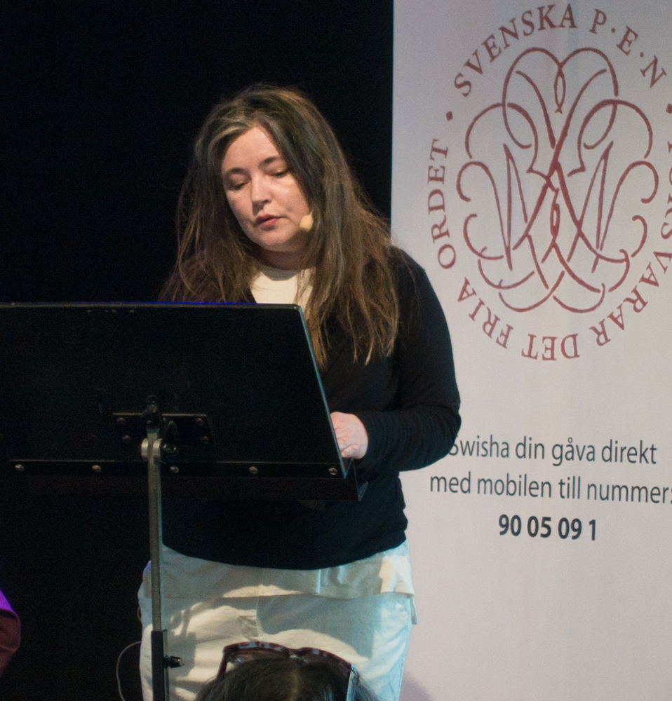 Ann Hallström läser egna dikter på Kulturhuset Stadsteatern i Stockholm den 8 maj 2018 i samband med Svenska PENs samtal över rubriken "Hur skyddar vi demokratin" med Ola Larsmo, Hédi Fried och Göran Greider.